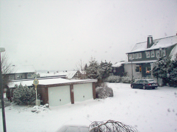 A picture from Wuppertal-Dönberg in Winter 2006. (Zum Lohbusch 11, Kreuzung Zum Steinpitter / Zum Lohbusch / Am Hitzhaus / Auf der Egge)